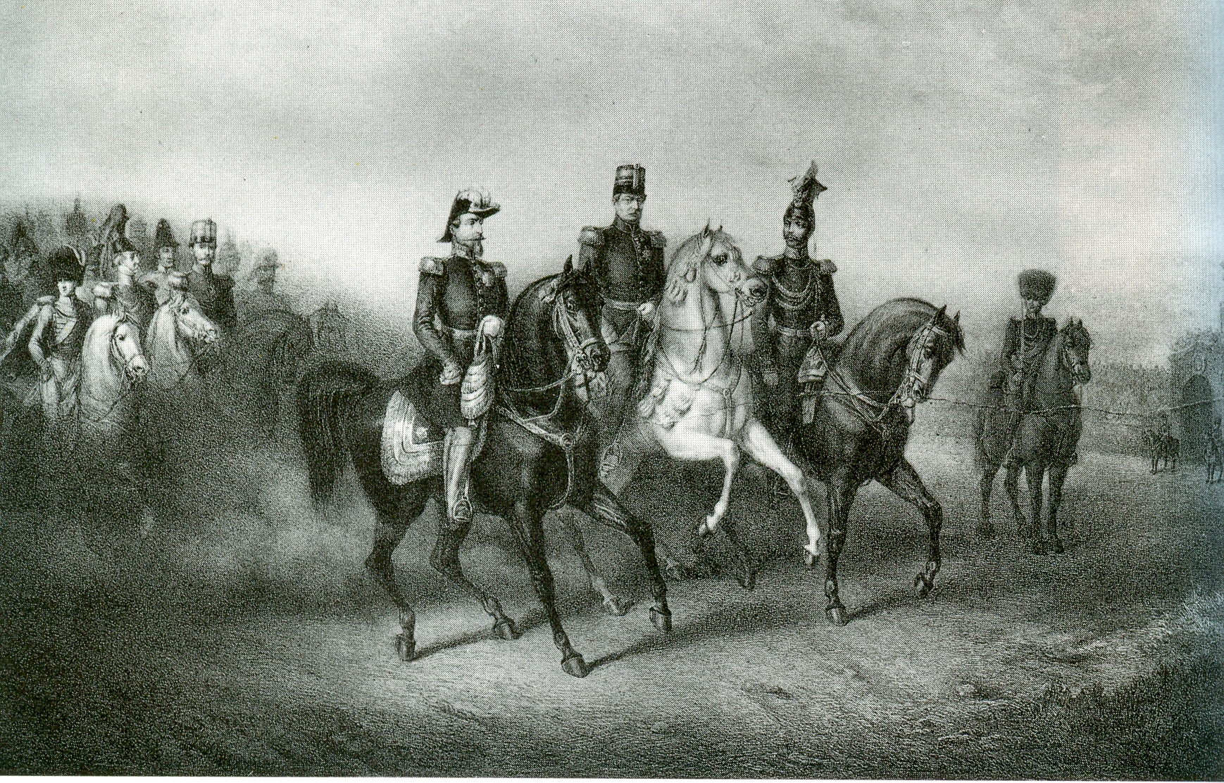 Kaisertreffen in Stuttgart, Herbst 1857 Kaiser Napoleon III., König Willhelm I., Zar Alexander II. von Rußland beim Besuch des Canstatter Volksfestes Lithographie Württembergische Landesbildstelle, Stuttgart